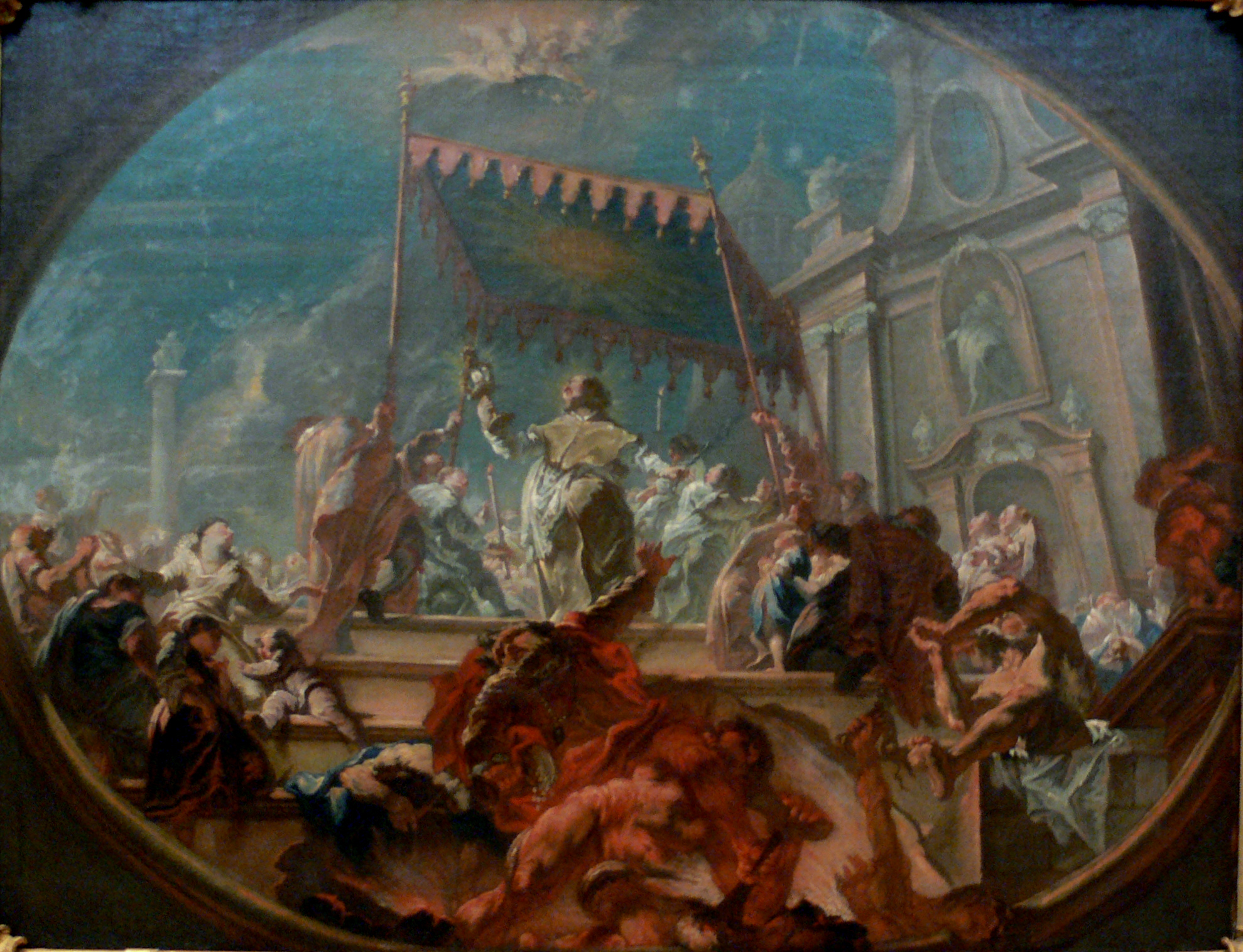 Der Triumph des hl. Nobert über den Irrlehrer Tanchelm im Jahre 1124